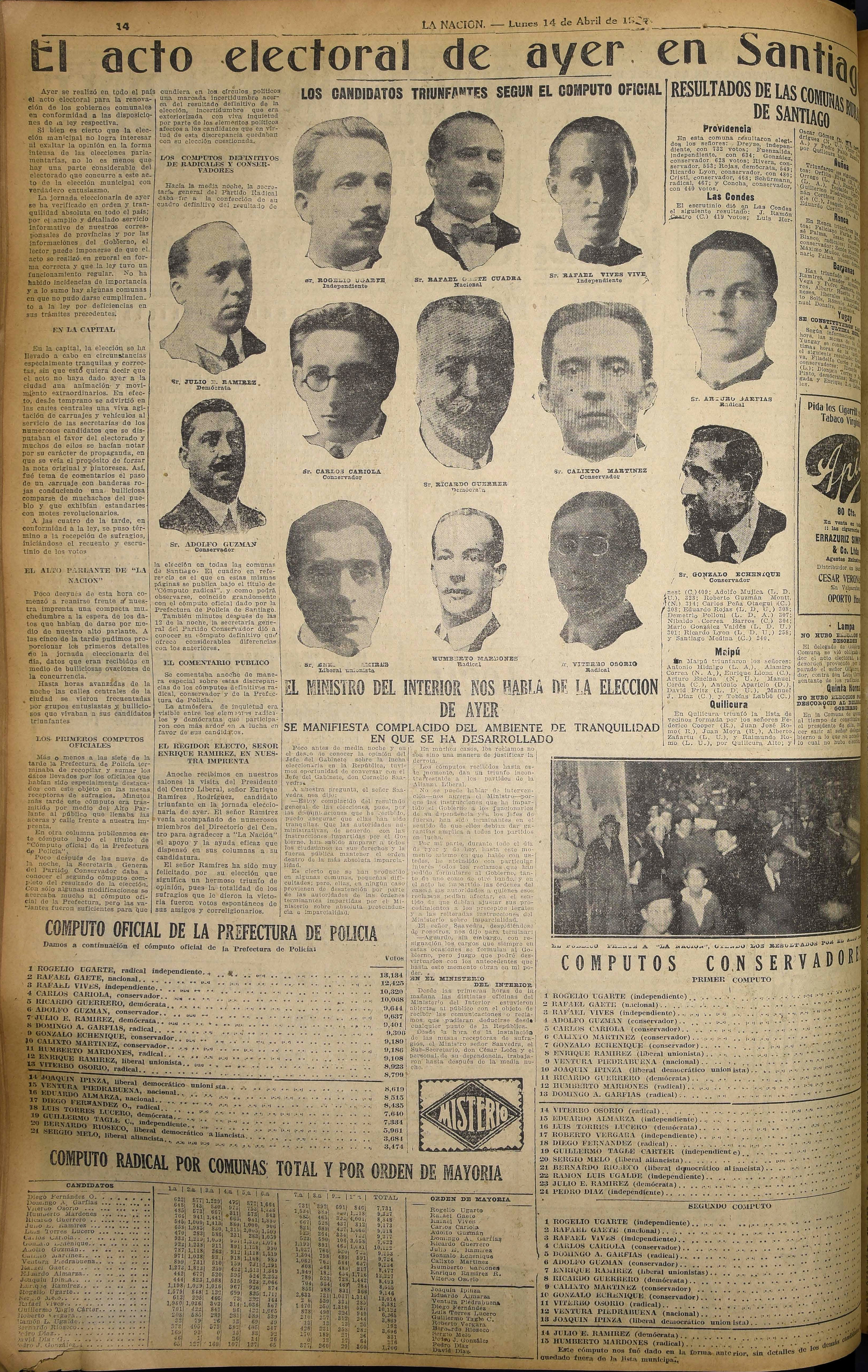 Artículo noticioso del periódico chileno La Nación.